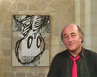 Portrait de Gérard Titus-Carmel